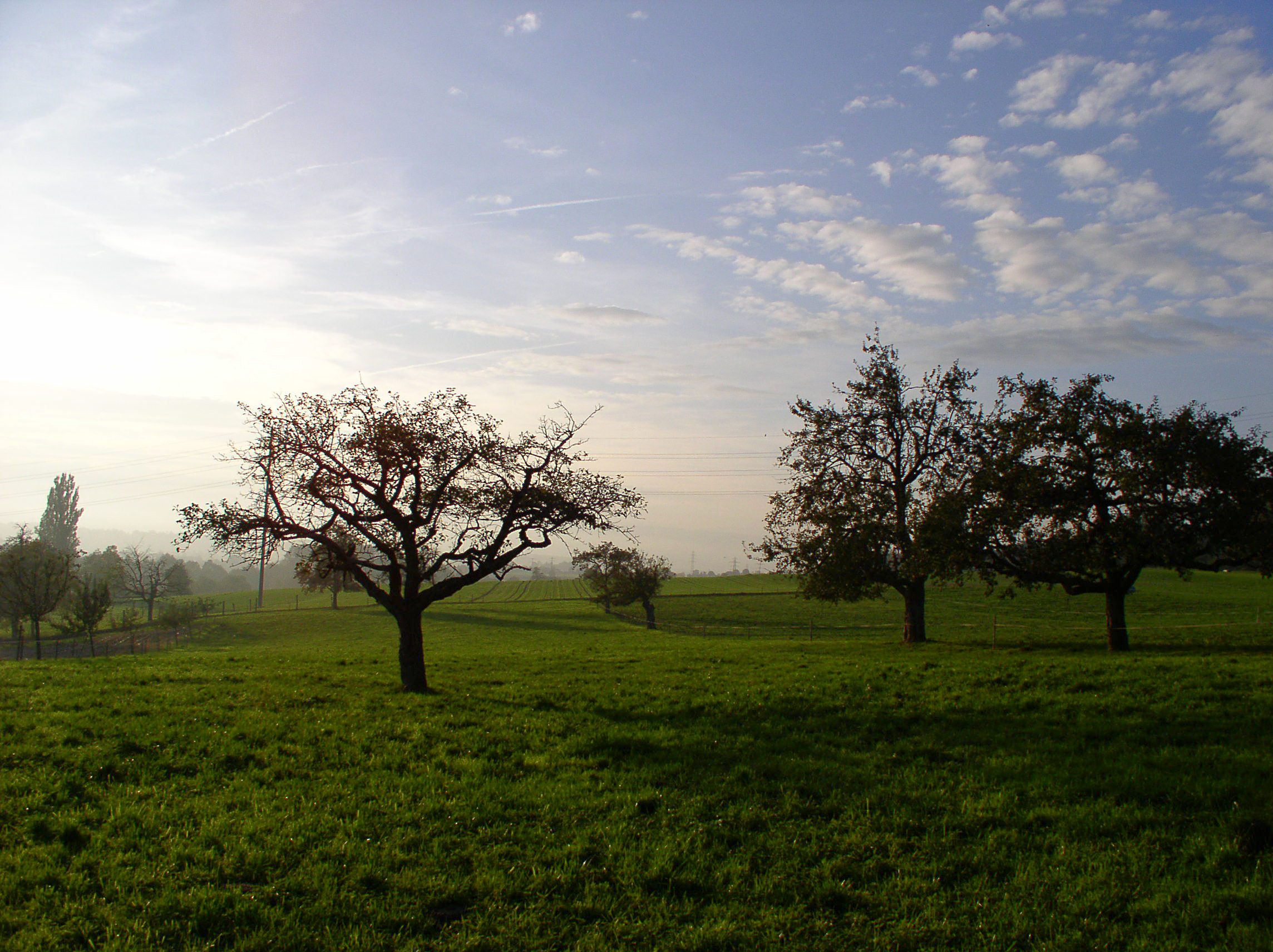 Description: Zuger Landschaft in der Nähe des Steinhauserwaldes, oberhalb von Zug Source: photo taken by me, October 2004, modified by Tysto Photographer: Baikonur